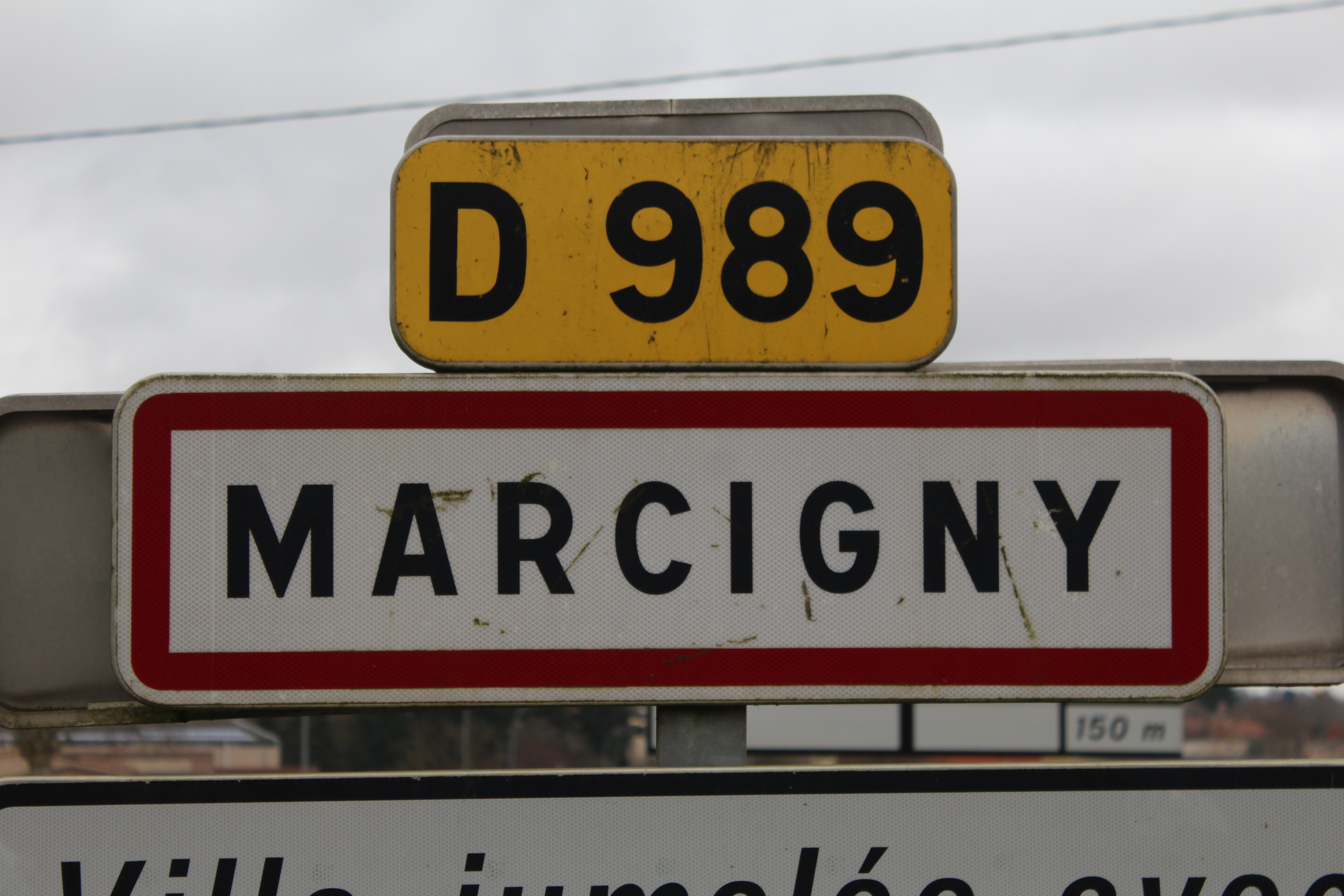 Panneau d'entrée dans Marcigny.